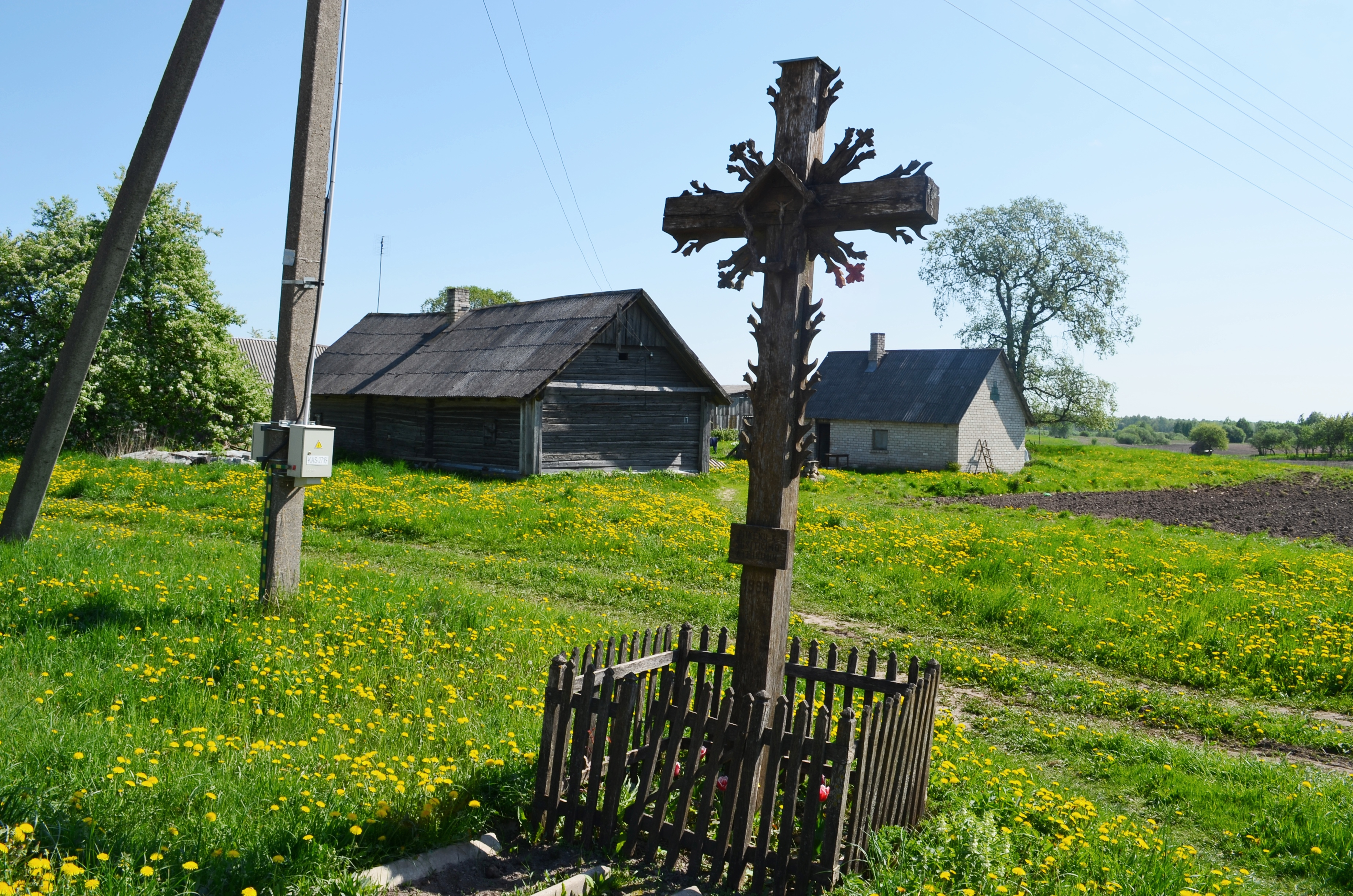 Kryžius Mikėnuose, Siesikų sen., Ukmergės raj.